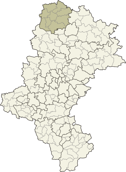 Powiat kłobucki w województwie śląskim